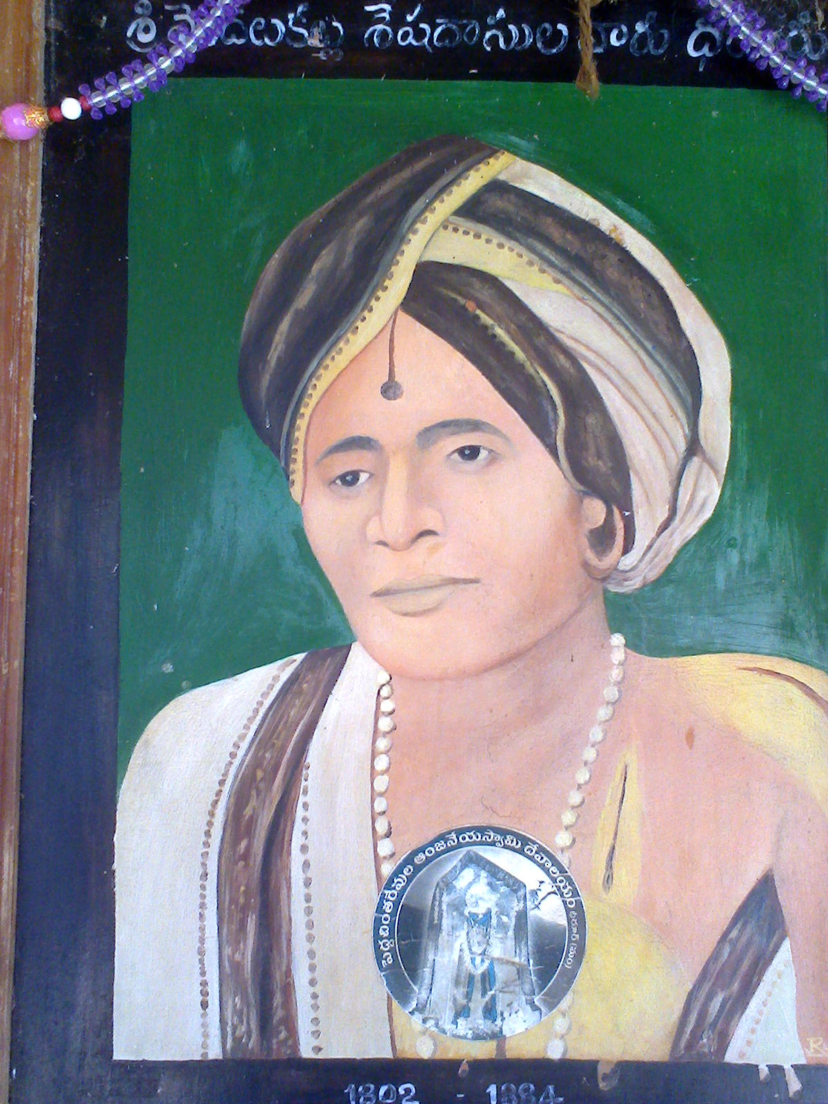 శ్రీ శేషదాసులు